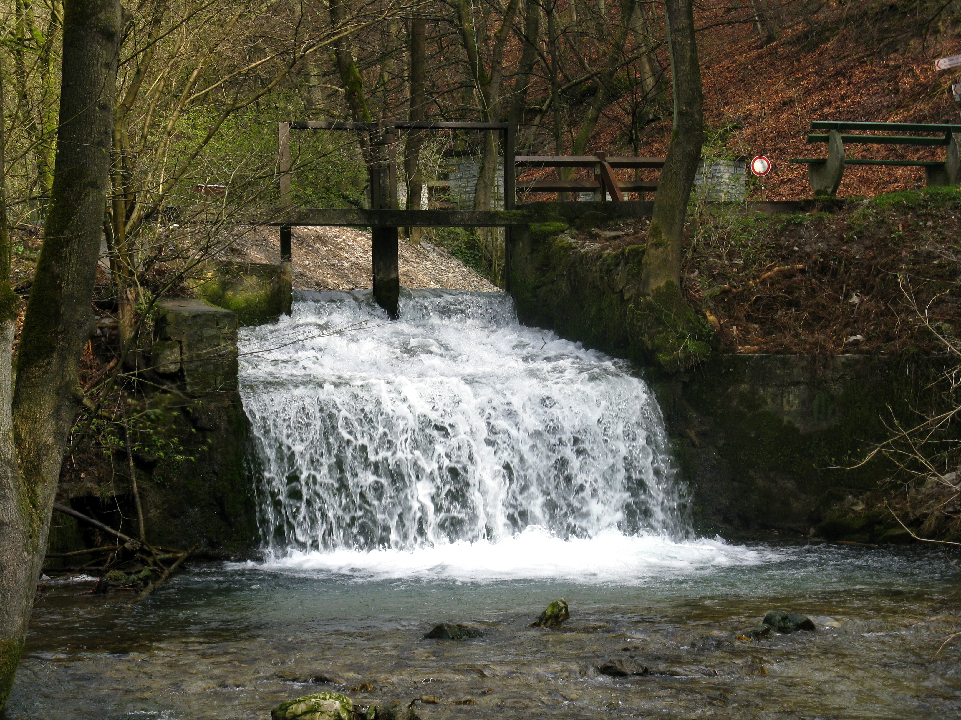 Die Strothe an ihrem Oberlauf beim Wasserwerk in Kohlstädt, Gemeinde Schlangen, Kreis Lippe, Nordrhein-Westfalen, Deutschland.